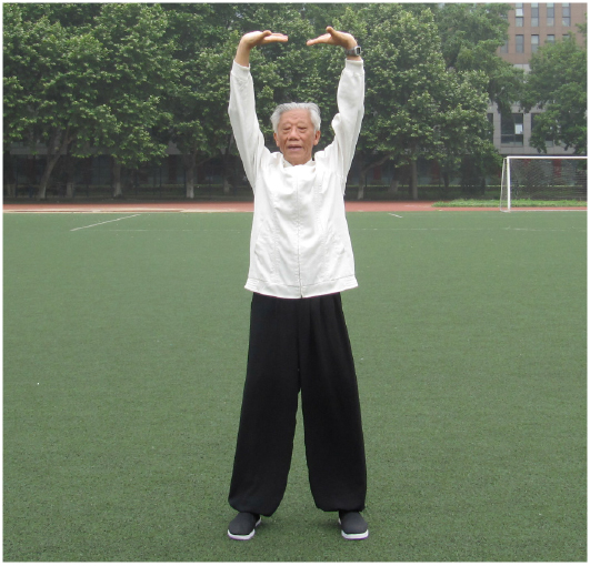 Abschnitt 1: Mit den Händen den Himmel stützen und den Dreifachen-Erwärmer-Meridian ausrichten